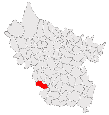 Categorie:Hărţi ale judeţului Buzău